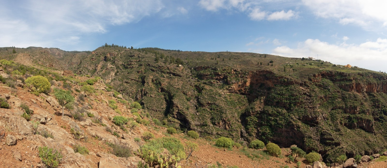 Barranco de Erques desde Vera de Erques, Tenerife.